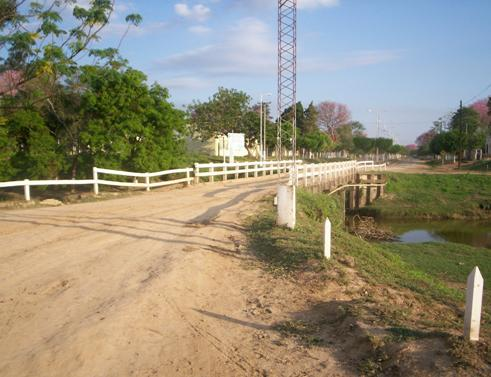 El puente blanco, la entrada principal al pueblo de Siete Palmas.